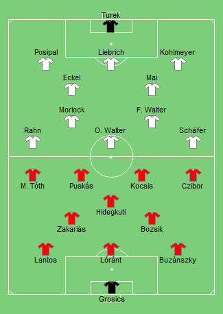 Fußball WM Finale 1954: Deutschland – Ungarn